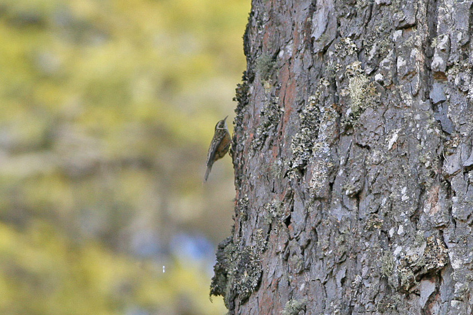 Certhia nipalensis, between Punakha and Trongsa, Bhutan